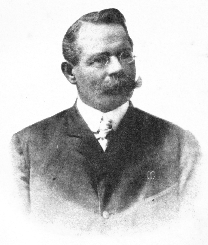 Max Uhle (1856-1944) arqueólogo alemán, cuyo trabajo en el Perú, Chile, Ecuador y Bolivia a finales del siglo XIX y principios del siglo XX tuvieron un impacto significativo en la práctica de la arqueología de América del Sur.